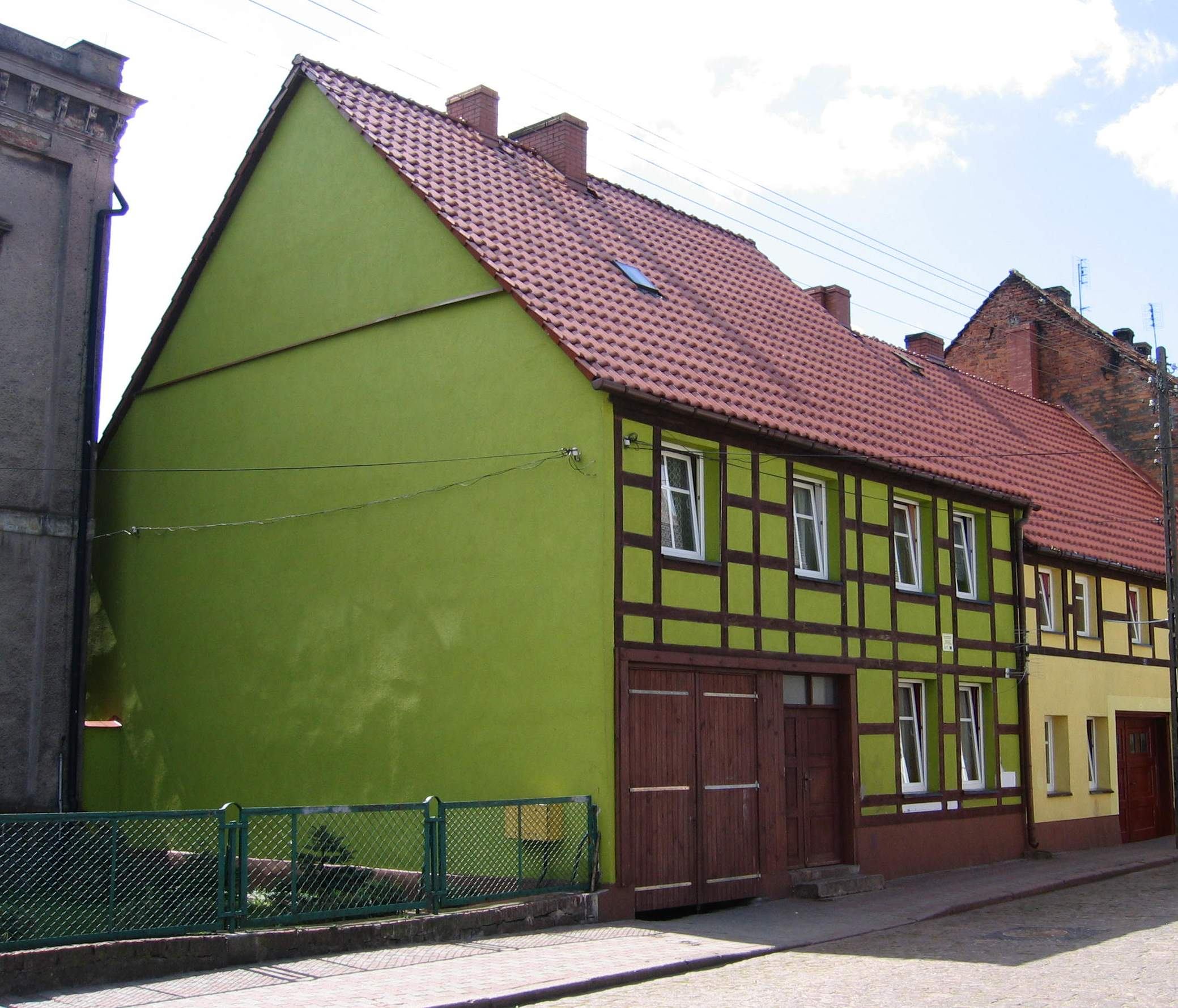 budynek mieszkalny Mieszkowice ul. Sienkiewicza 54, Mieszkowice